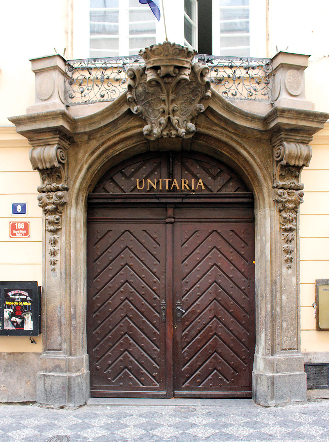 Sídlo Náboženské společnosti českých unitářů, Praha 1, Staré Město, Karlova ulice 8.